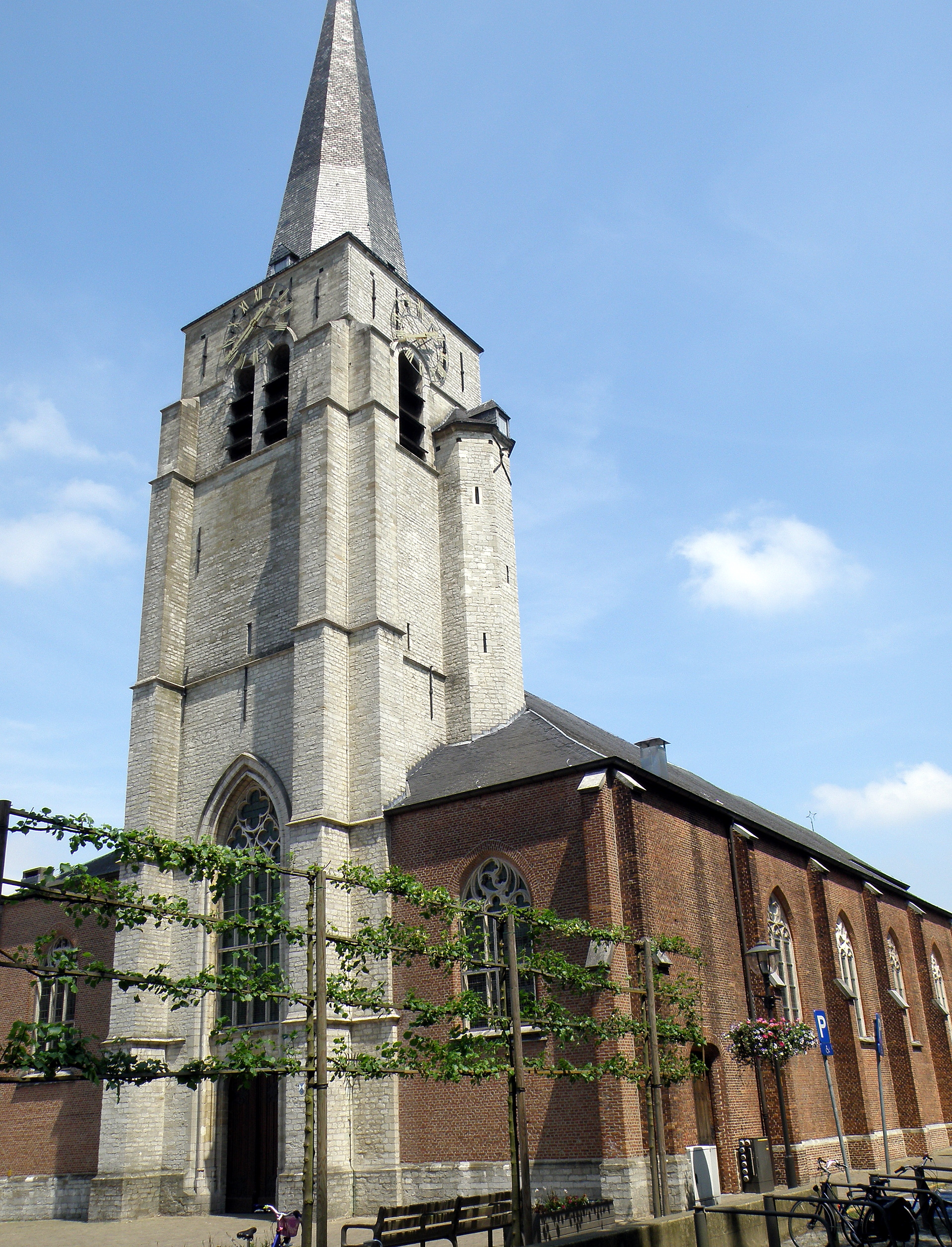 Antwerpen, district Wilrijk. Sint-Bavokerk, gelegen aan de Sint-Bavostraat te Wilrijk. Toren gotisch, waarsch. begin 16de eeuw; schip, kruisbeuk en koor neo-gotisch (1842-1849). Vgl. Inventaris van het Onroerend Erfgoed.